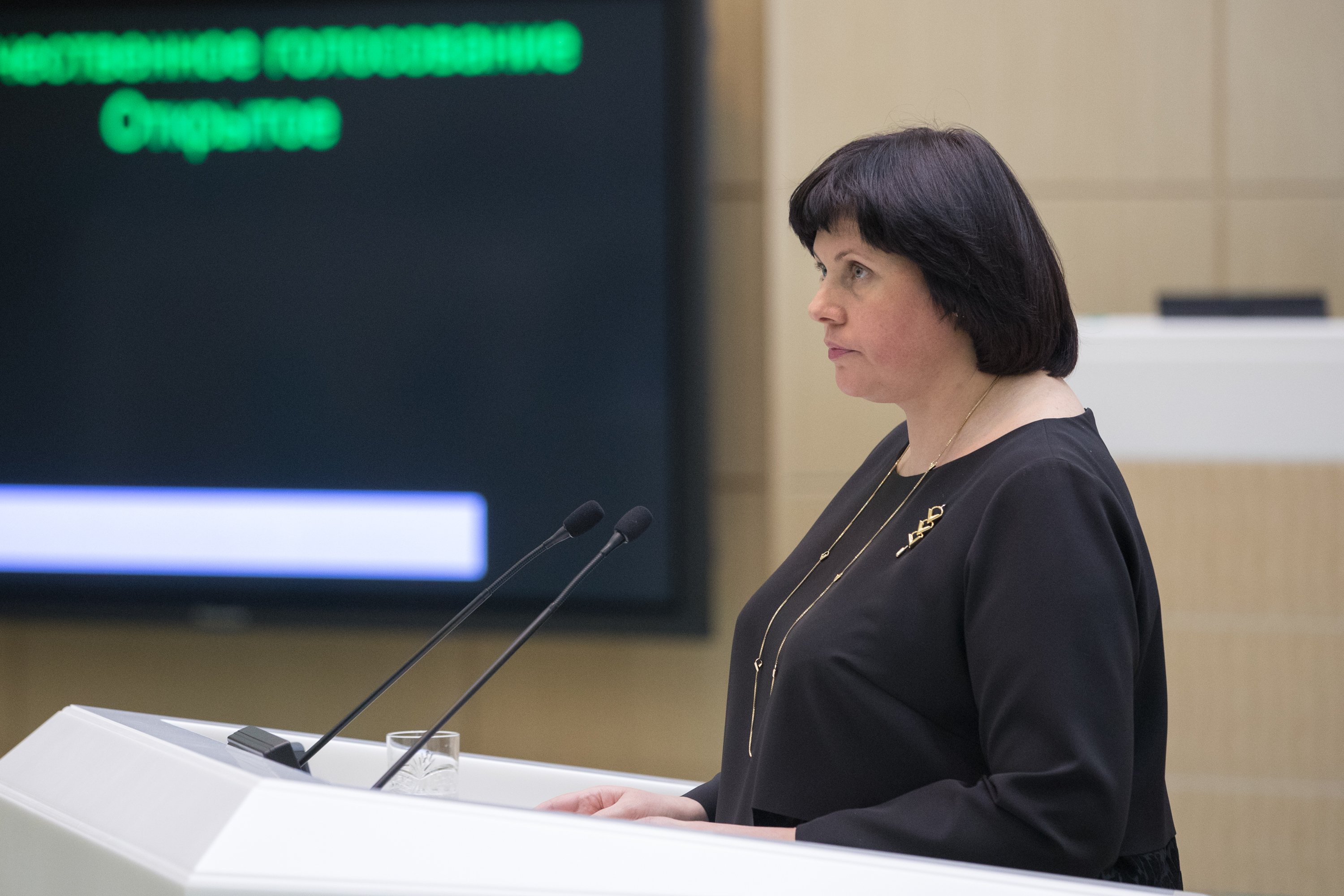 Афанасьева, Елена Владимировна